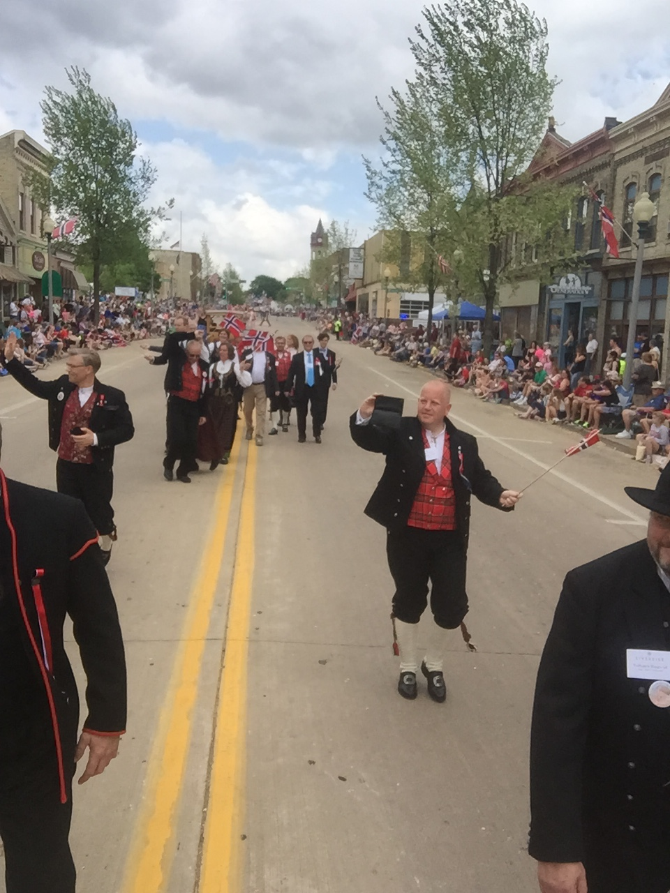 17. mai-paraden i Stoughton, WI i 2015.